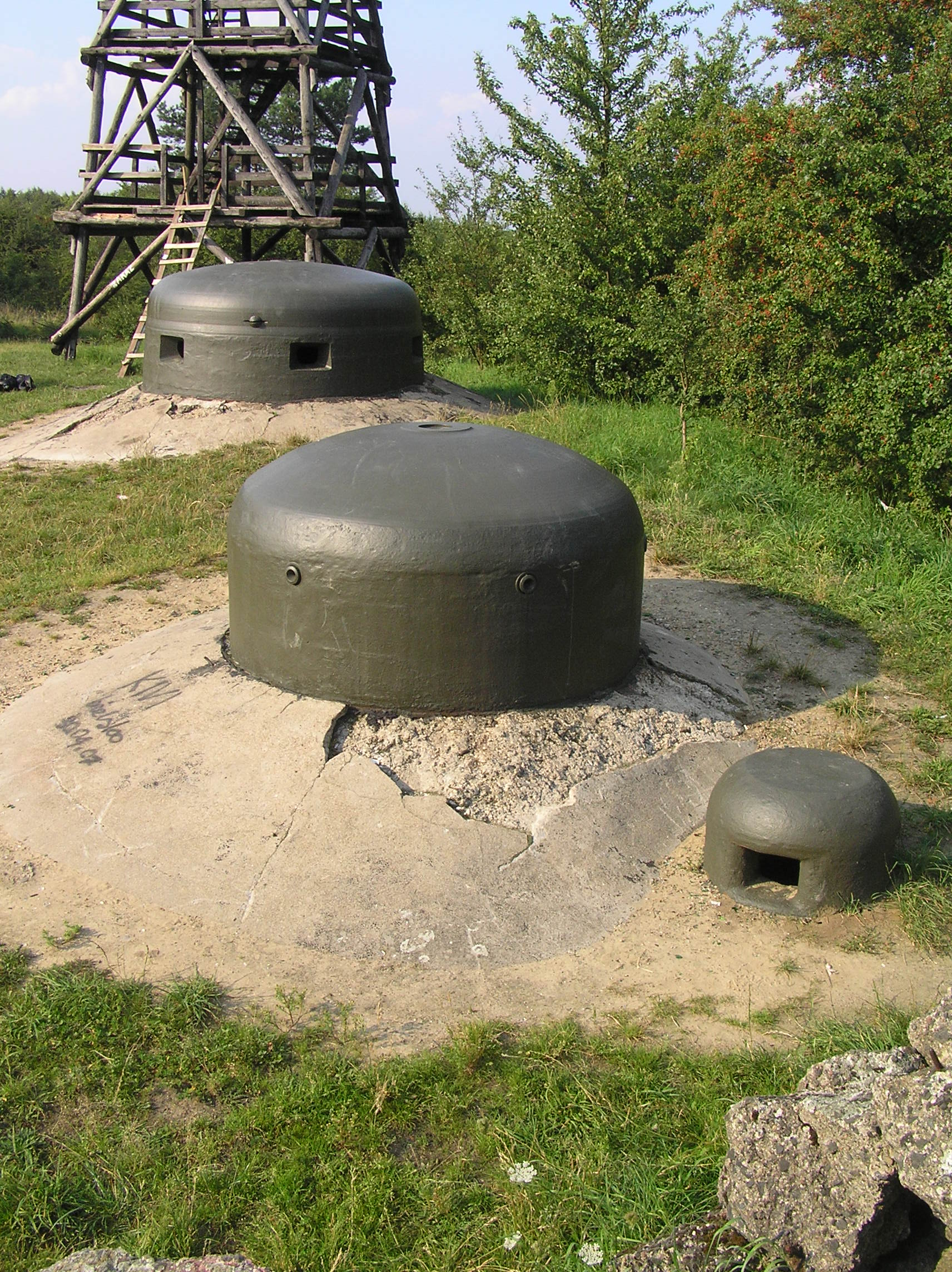 Bunkers in MRU: Werkgruppe York